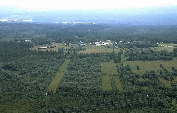 Motiv: Övre Kuouka Nyckelord: Flygbilder, Riksintressen Kategori: Fjällbygd Övre Kuouka